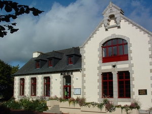 Mairie d'uzel